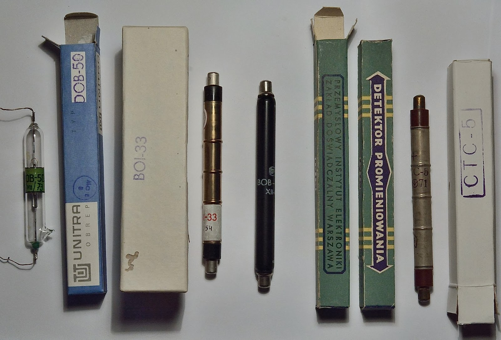 Liczniki Geigera - polski szklany DOB-50 (Unitra OBREP), polski metalowy BOI-33, polski szklany BOB-33 (Przemysłowy Instytut Elektroniki) i radziecki metalowy STS-5